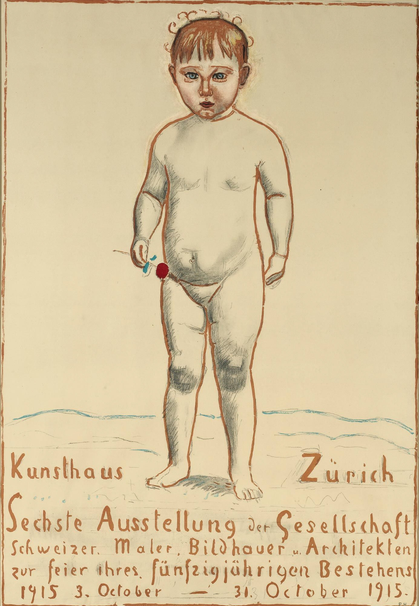 Plakate zur Sechsten Ausstellung der Gesellschaft Schweizer Maler, Bildhauer, Architekten zur Feier ihres fünfzigjährigen Bestehens 1915. 3. Oktober - 31. Oktober 1915, Kunsthaus Zürich. Farblithographie, 101 x 70 cm. Unten rechts im Stein monogrammiert: FH. Gedruckt bei Wolfensberger in Zürich.